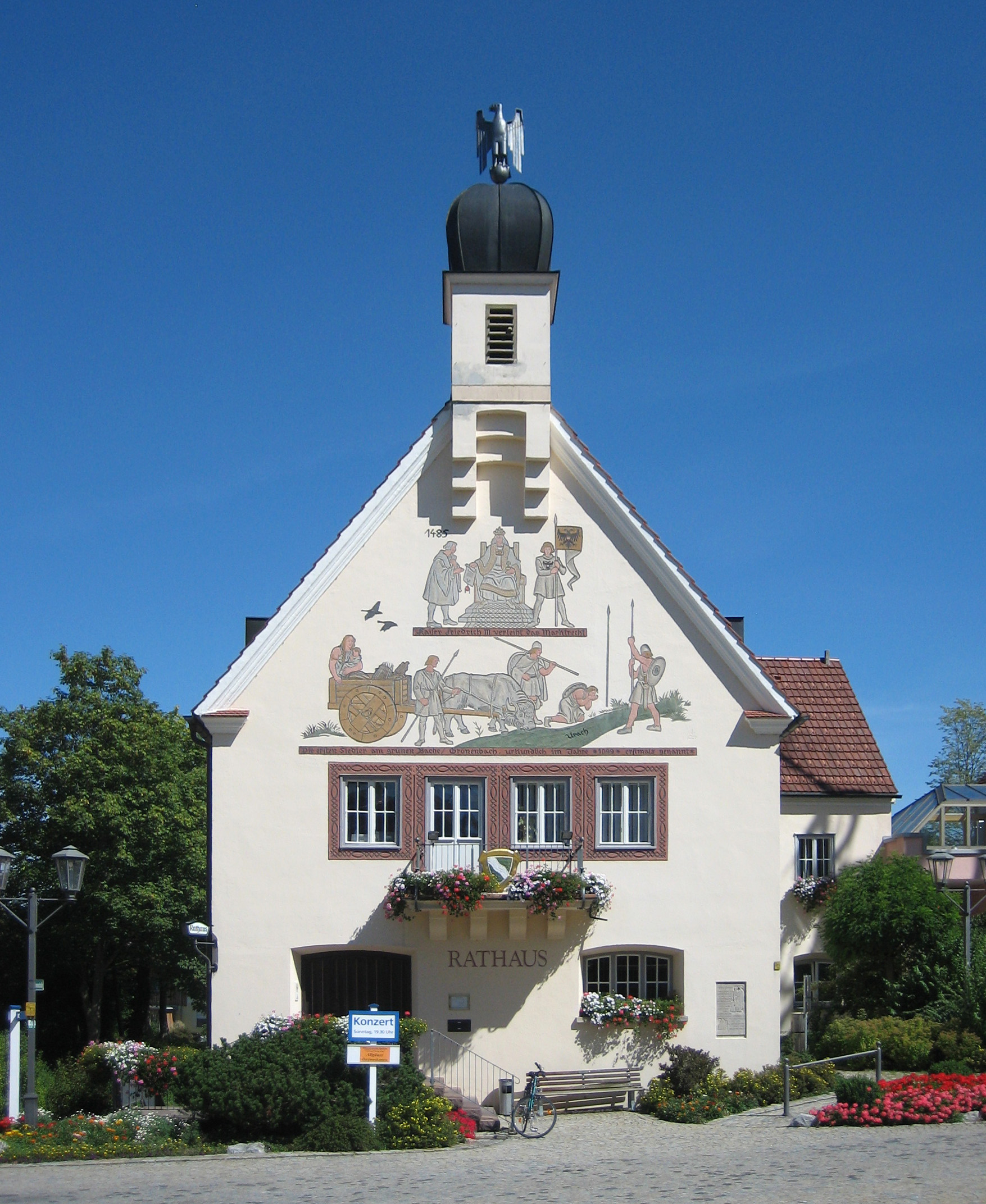 Rathaus in Bad Grönenbach, erbaut 1936/1937